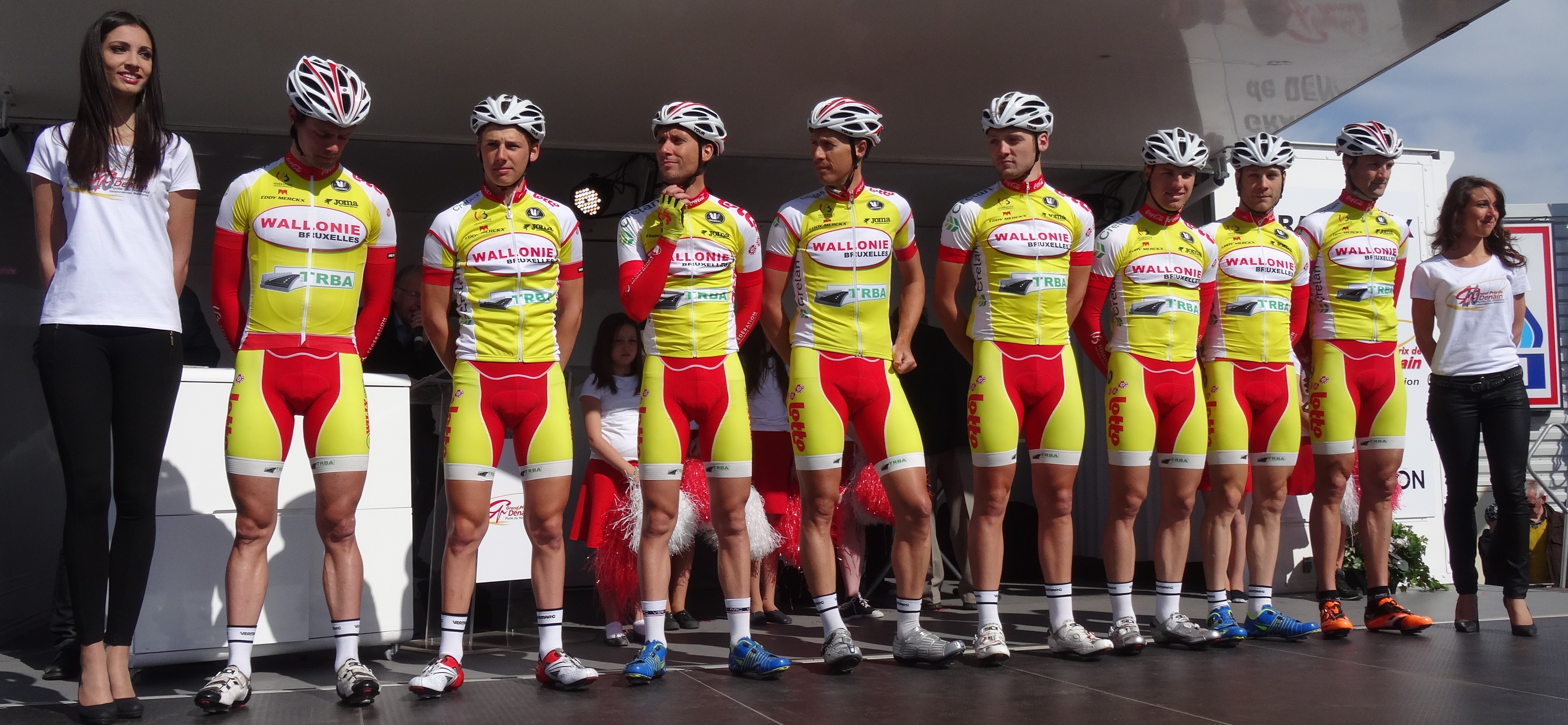 Reportage réalisé le jeudi 17 avril à l'occasion du départ et de l'arrivée du Grand Prix de Denain 2014 à Denain, Nord, Nord-Pas-de-Calais, France.